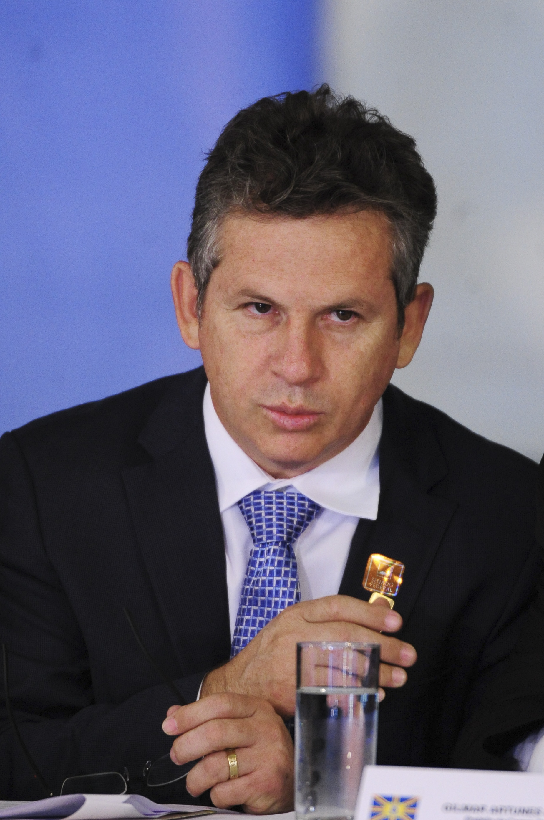 O presidente do Senado Federal, senador Renan Calheiros (PMDB-AL), e o presidente da Câmara dos Deputados, Eduardo Cunha (PMDB-RJ), recebem prefeitos e autoridades do Poder Legislativo no Salão Negro do Congresso Nacional para debater o pacto federativo e desenvolvimento regional. Em destaque, prefeito de Cuiabá, Mauro Mendes. Foto: Pedro França/Agência Senado